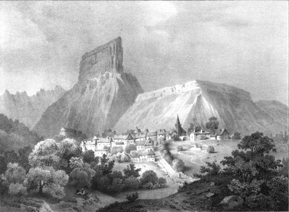 Album du Dauphiné - tome IV, litographie du Mont Aiguille, vue prise de Clelles